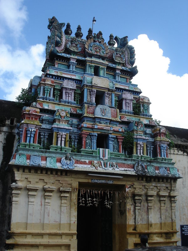 InnerGopuram